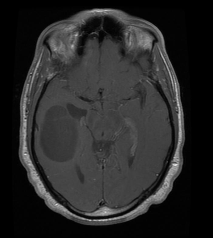 Oligodendroglioma, MRI T1 with gadolinium contrast